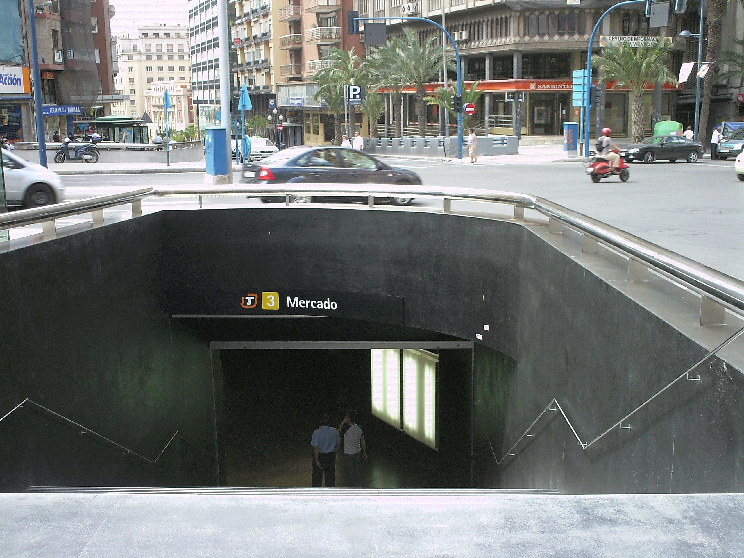 Zugang zur Station Mercado der Stadtbahn Alicante / Entrada de la estación Mercado del TRAM Metropolità d'Alacant